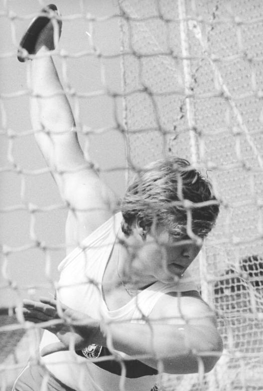 Ilke Wyludda ADN-ZB Sindermann 28.5.89 Rostock: Werfertag- An der Parade der Werferasse nahm in der Bezirksstadt auch die Diskuswerferin Ilke Wyludda vom SC Chemie Halle teil. Mit 70,78 Metern erreichte sie die derzeitge Jahresweltbestleistung in ihrer Disziplin.